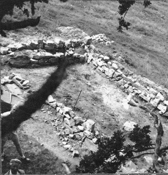 Kyrkoruinens långhus. Kategori: (01) ExteriörerKyrkoruinens långhus.